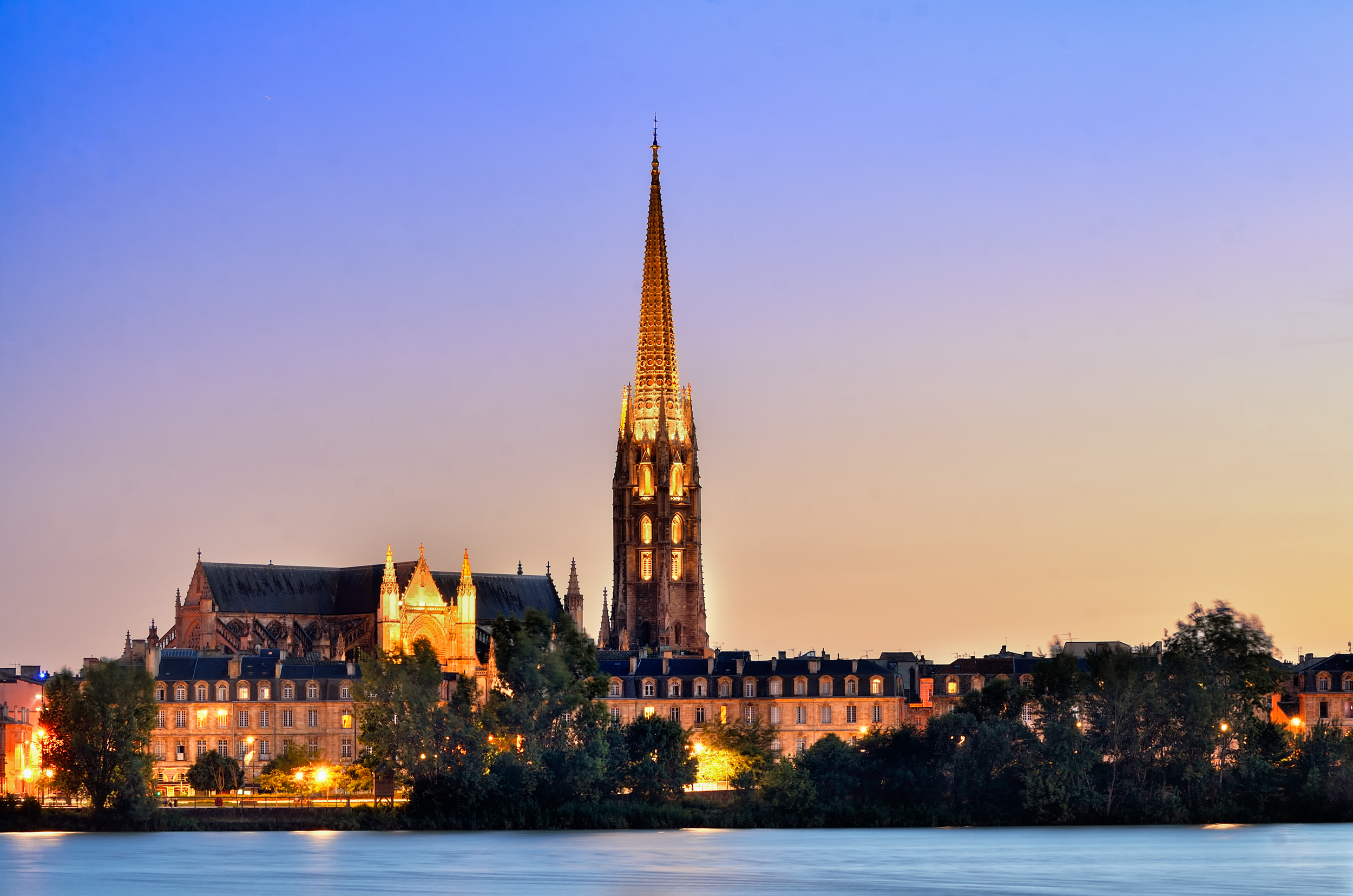 Basilique Saint-Michel de Bordeaux (33).